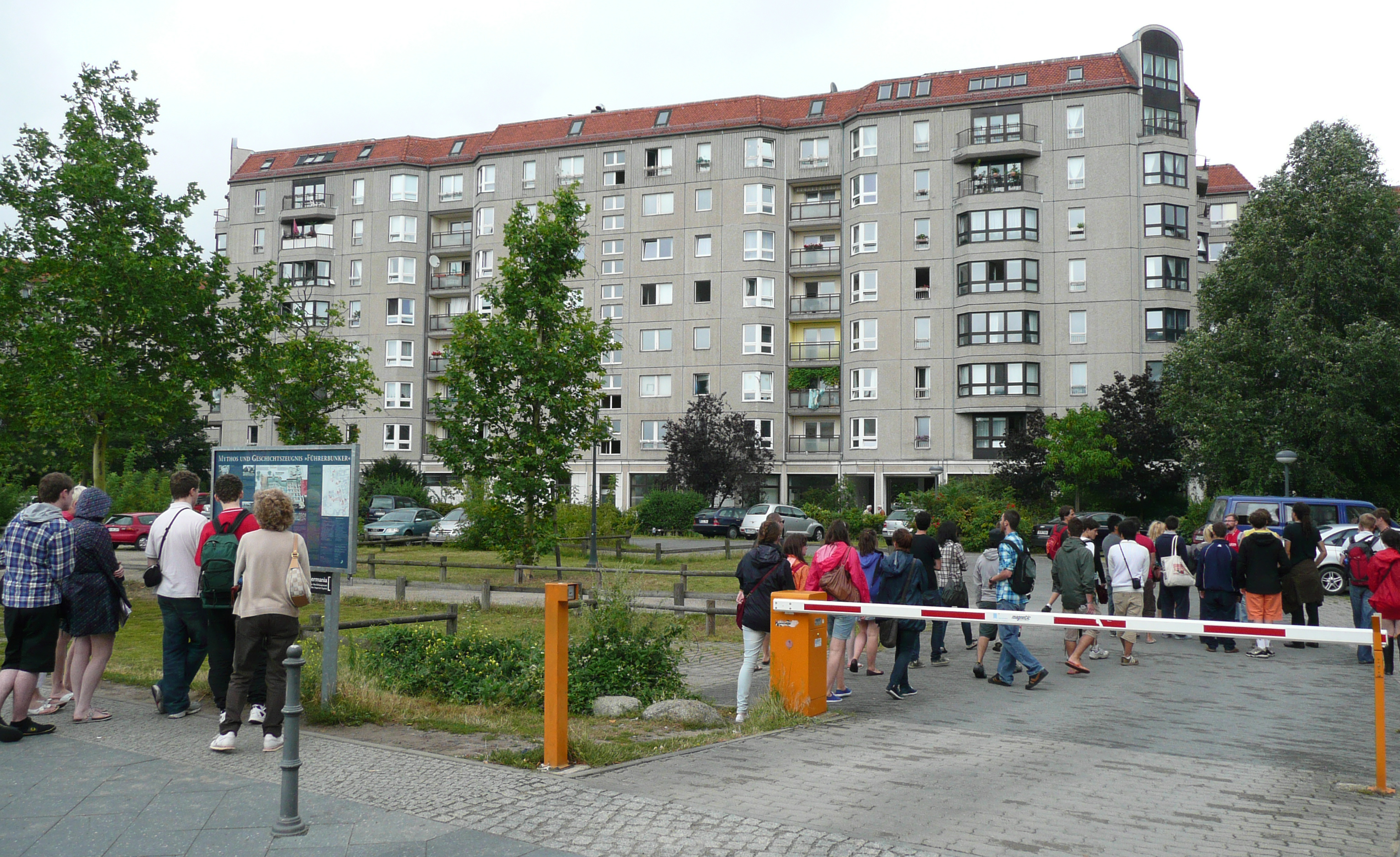 Das Gelände des ehemaligen Führerbunkers in Berlin